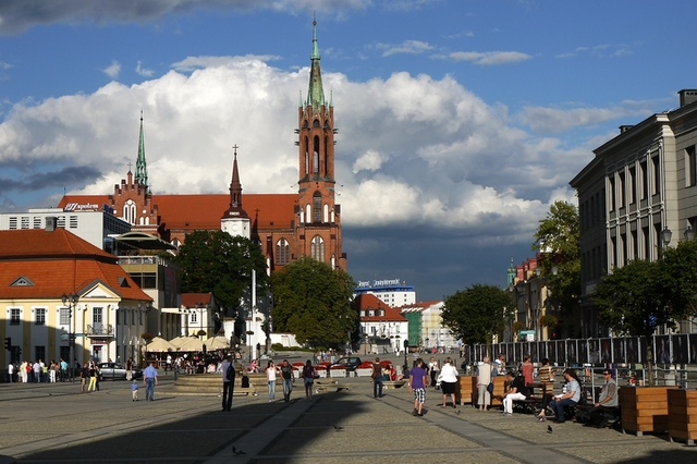 Białystok